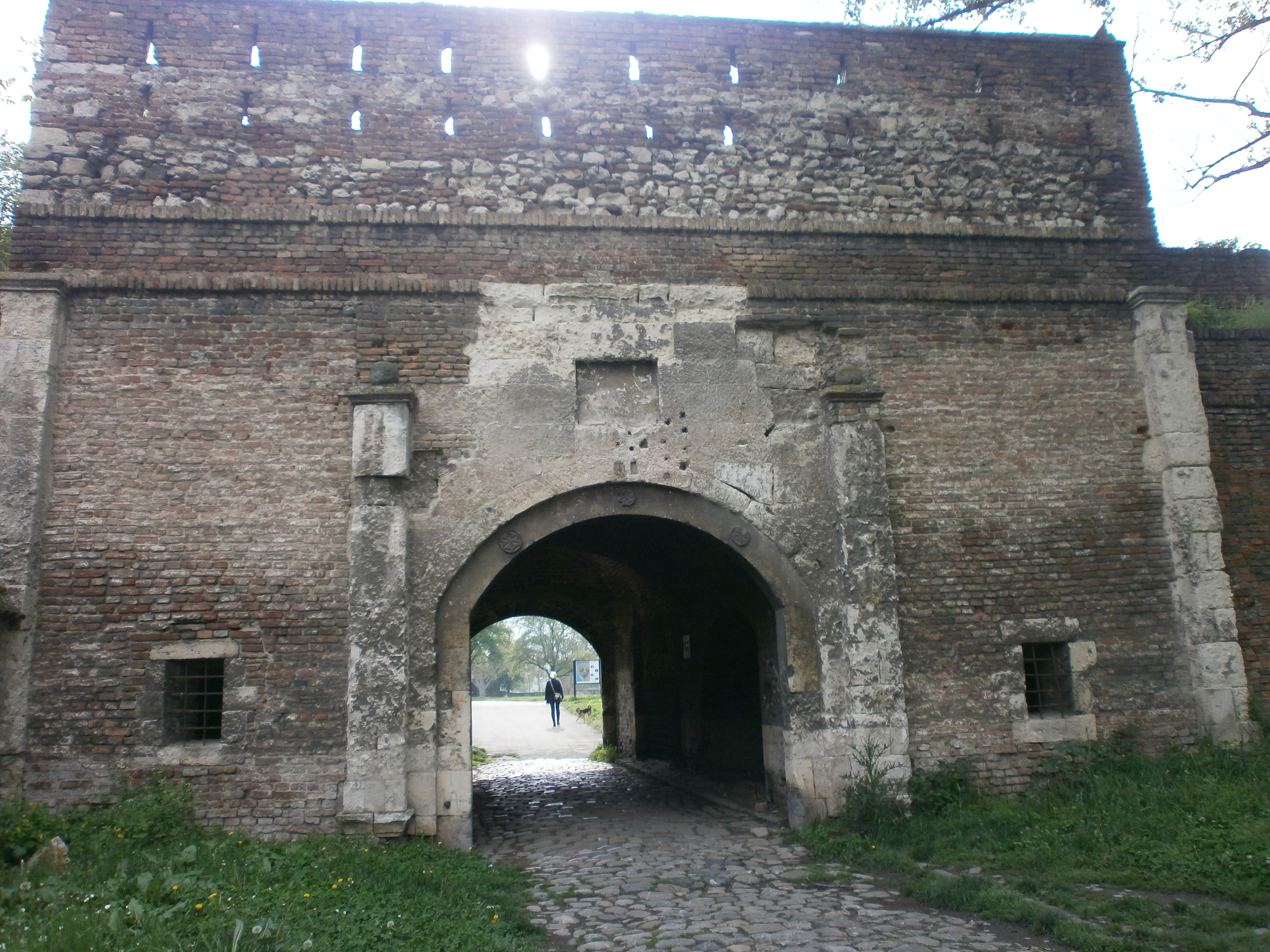 Kalemegdan